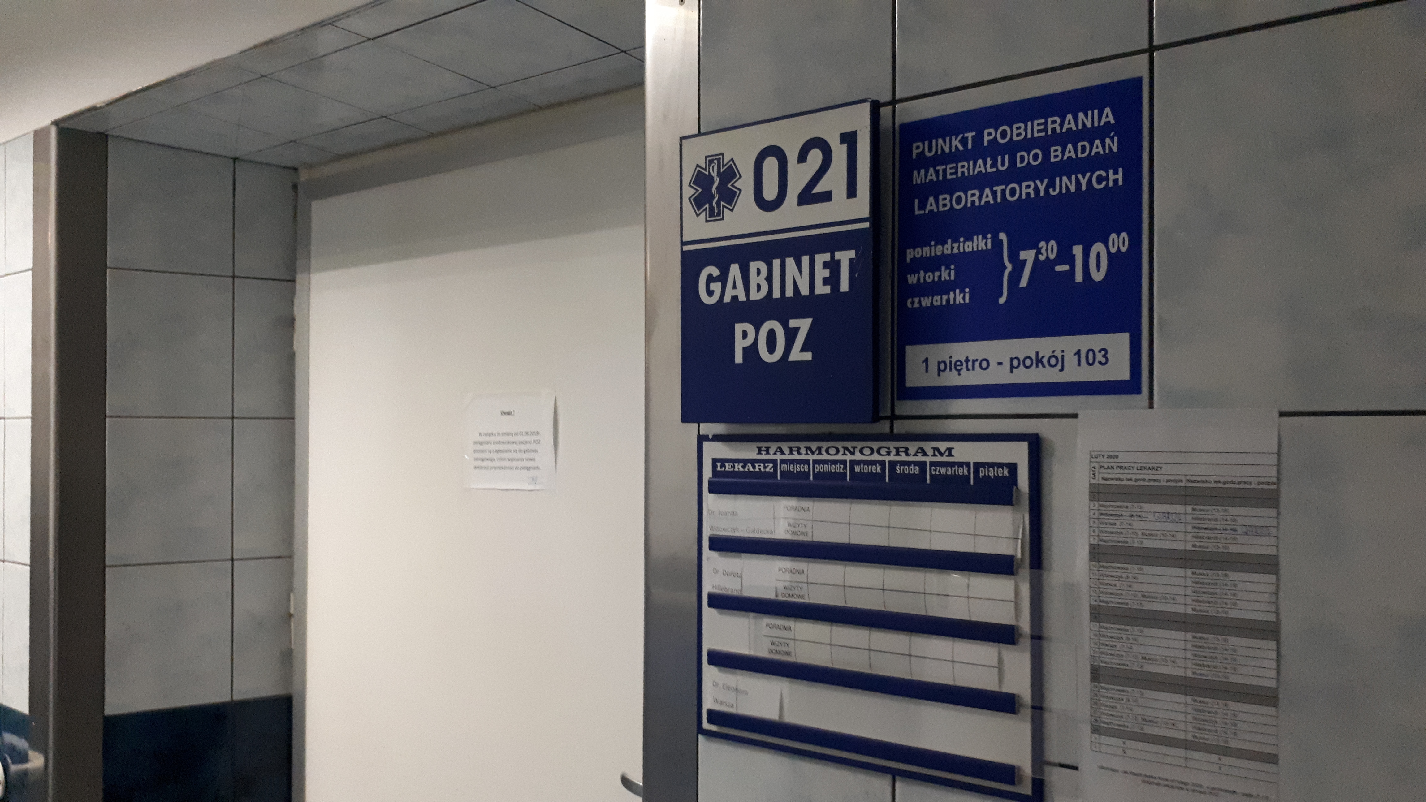 Wojewódzka Stacja Ratownictwa Medycznego w Łodzi - Poradnia POZ